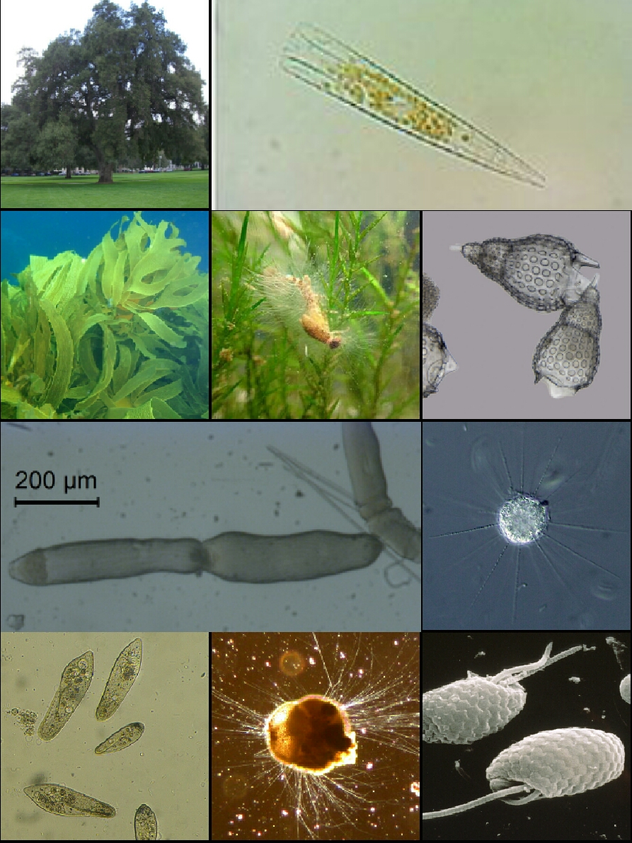 Collage de diaphoretickes.